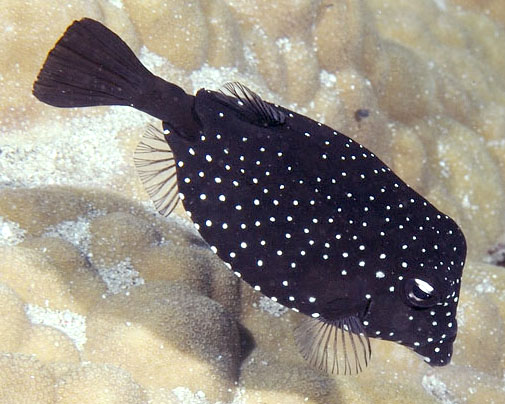 Un poisson-coffre à peau dure (Ostracion trachys) à la Réunion.